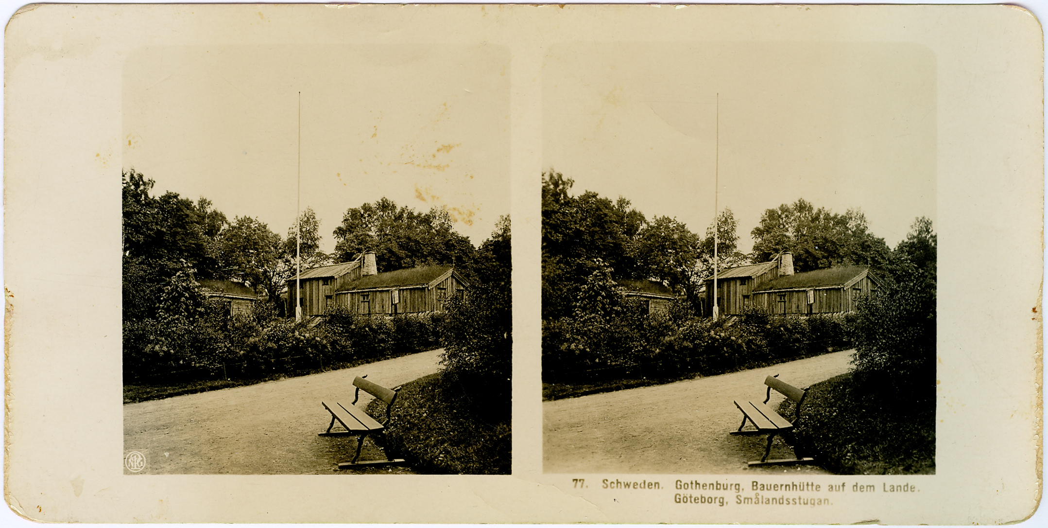 Gothenburg, Schweden. Kleine Hütte im Schlosswald